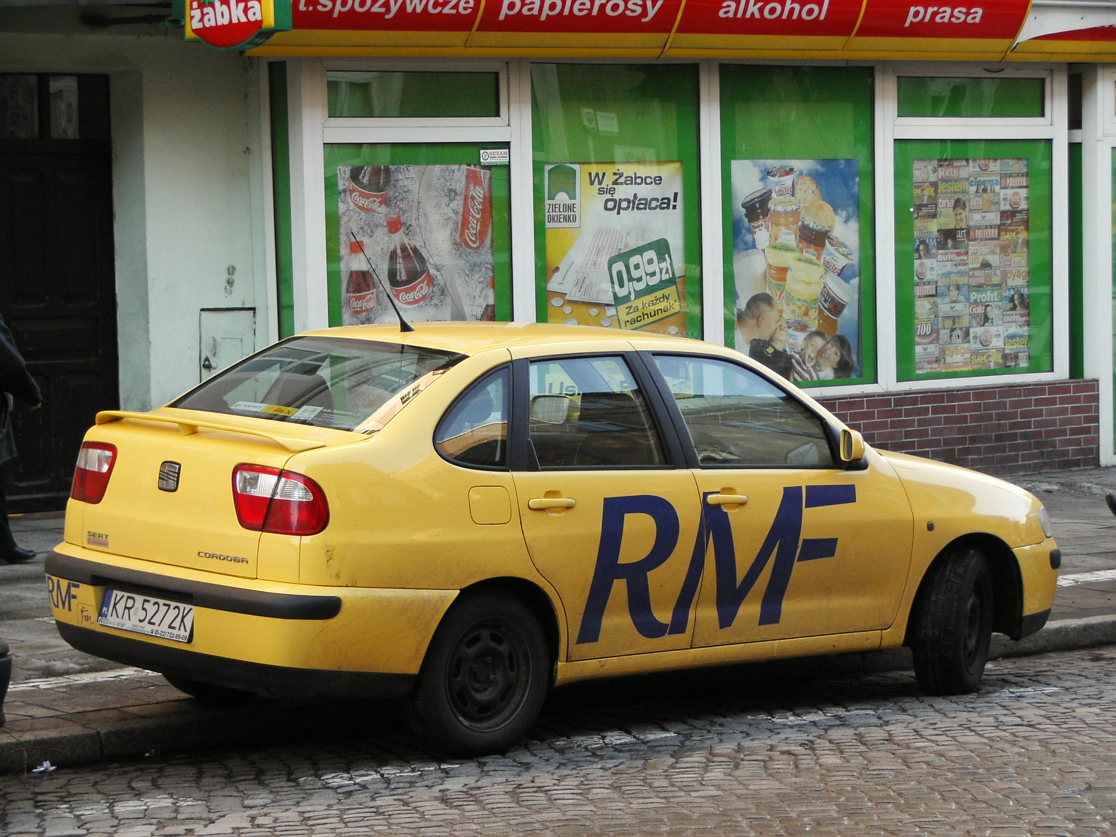 RMF FM Seat Cordoba w poznańskim oddziale.